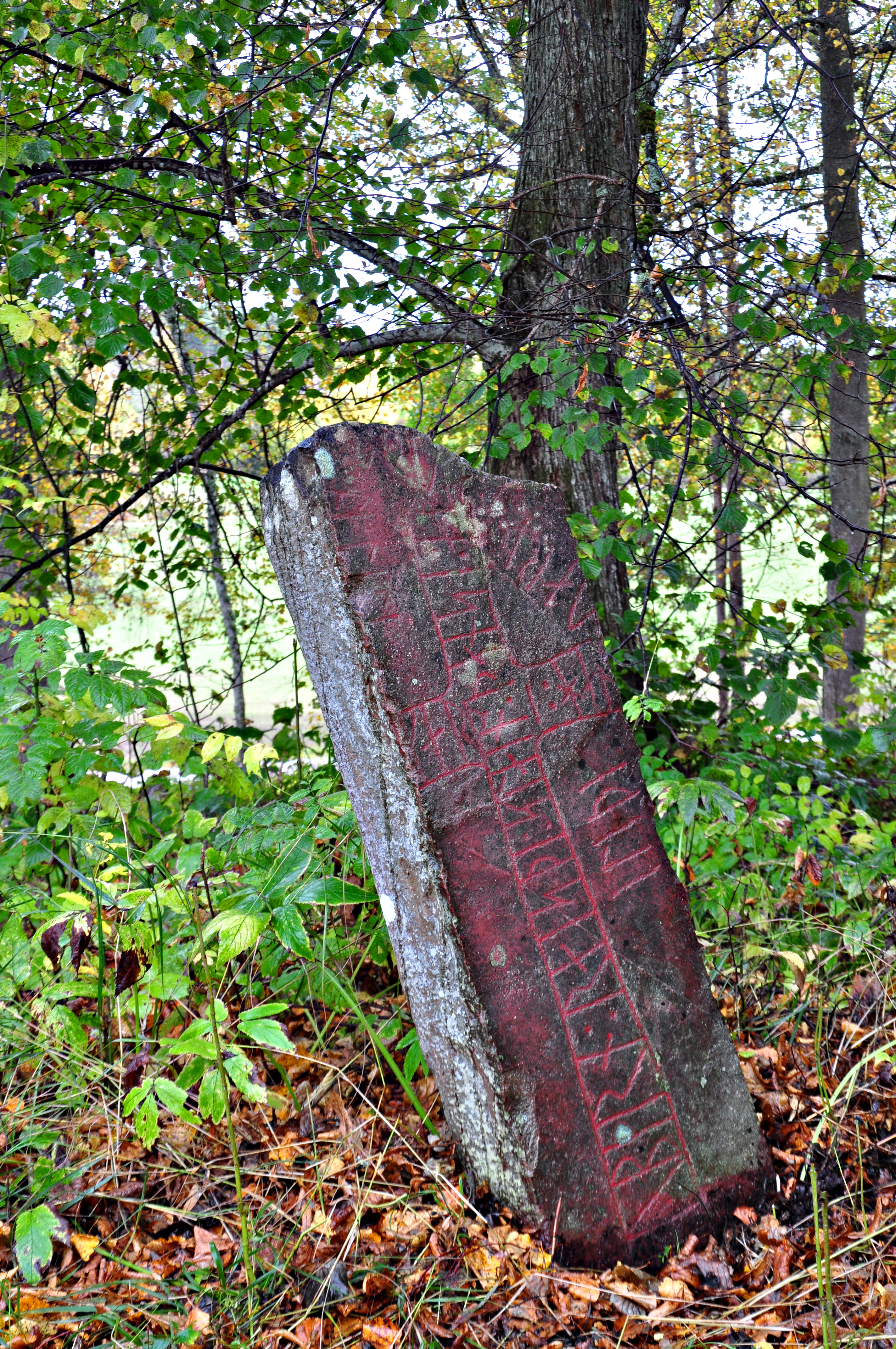 Runsten Sö 160 Täckhammar, Södermanland, Sverige